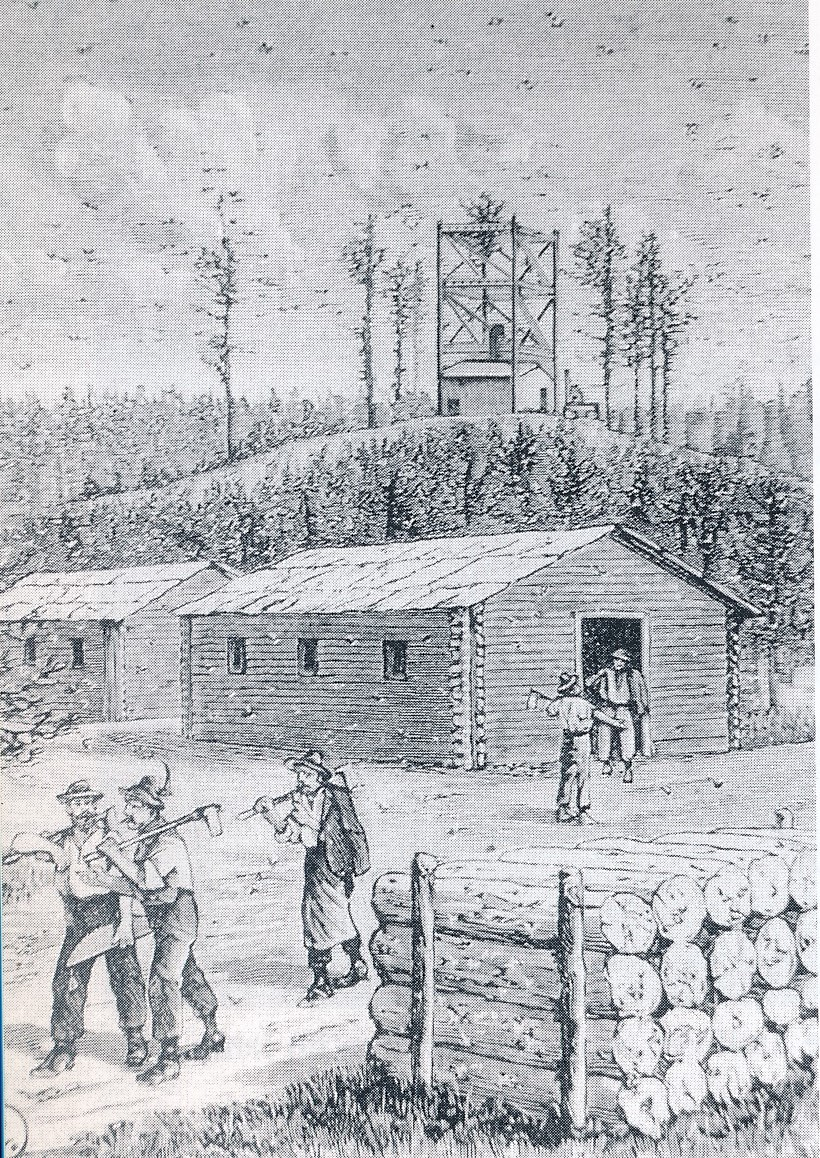 In den Jahren 1889 bis 1891 waren mehrere Tausend Arbeiter im Ebersberger Forst und anderen Wäldern beschäftigt, um die durch die Nonnenraupe geschädigten Fichtenbäume zu fällen und abzutransportieren. Hierfür war, abgehend von einer Verladstelle nordwestlich des Bhf. Kirchseeon, eine Normalspureisenbahn eingerichtet worden, deren Verlauf heute noch aufgrund des Straßennamens "Waldbahn" in Kirchseeon, sowie in deren Verlängerung als "Waldbahn-Geräumt" im Eglhartinger bzw. Ebersberger Forst nachvollziehbar ist.